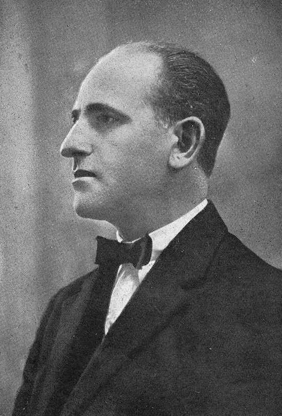 Fernando Martínez Morás, fotografía en Vida Gallega 1926